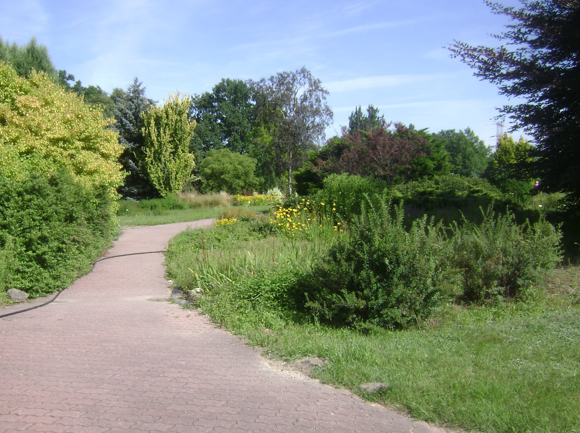 Ogród Botaniczny Polskiej Akademii Nauk w Warszawie